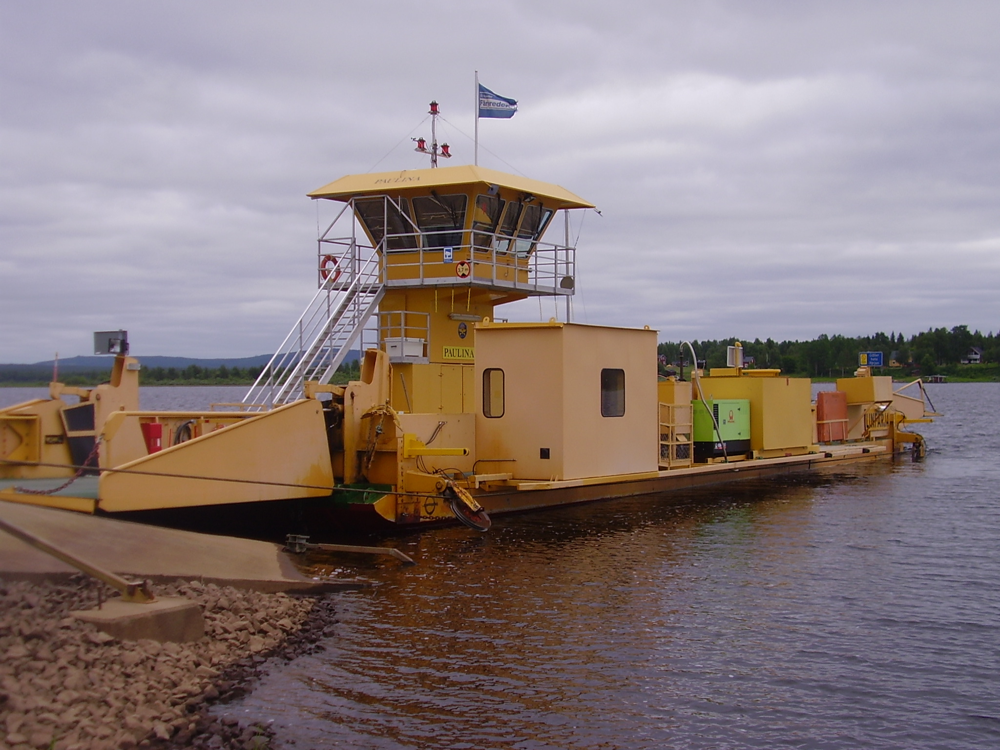 Bilfärjan Paulina, som går på Bohedenleden i Överkalix kommun